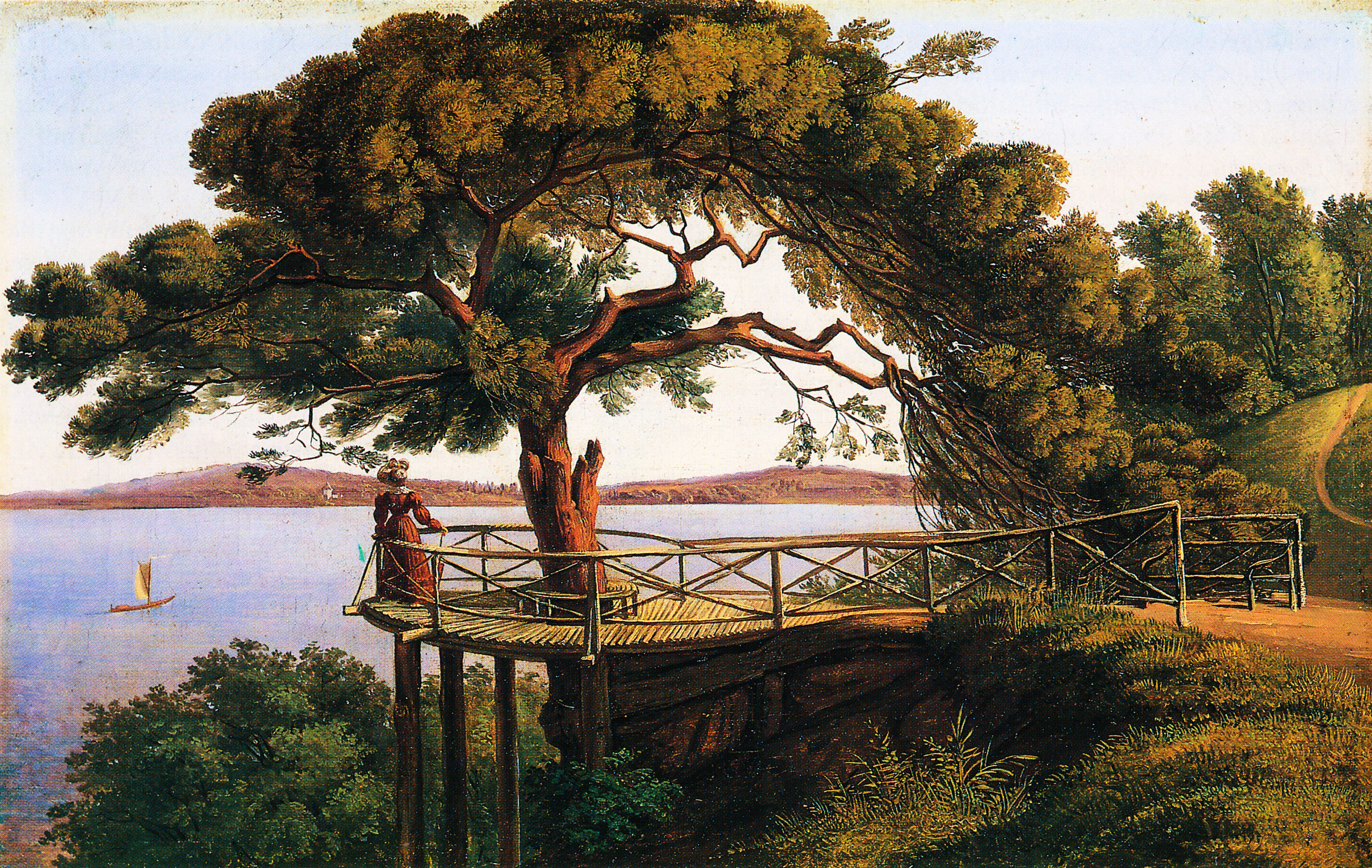 Die Baumkanzel im Park Klein-Glienicke, Gemälde von A.W.F. Schirmer, um 1837